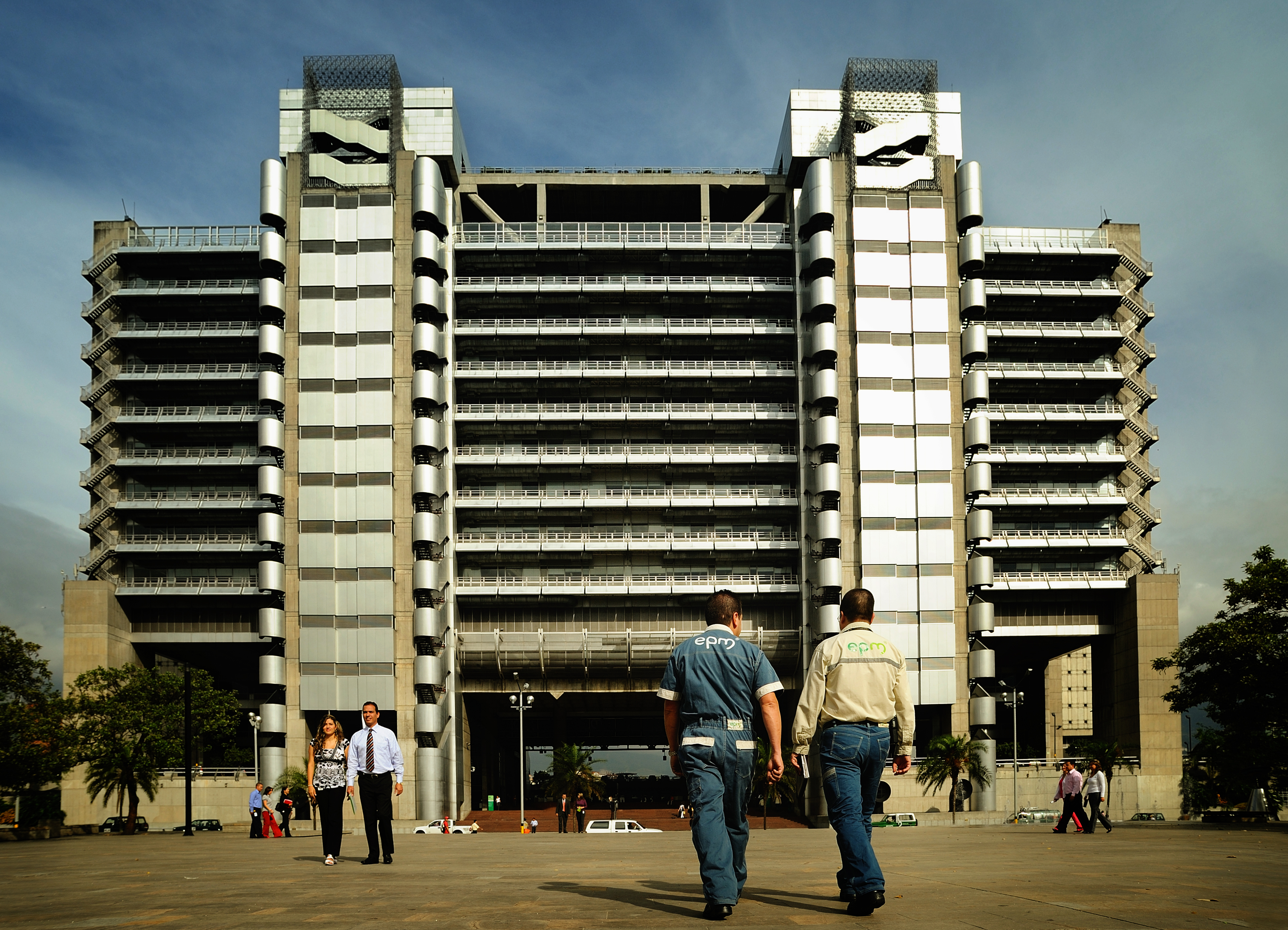 Edificio EPM